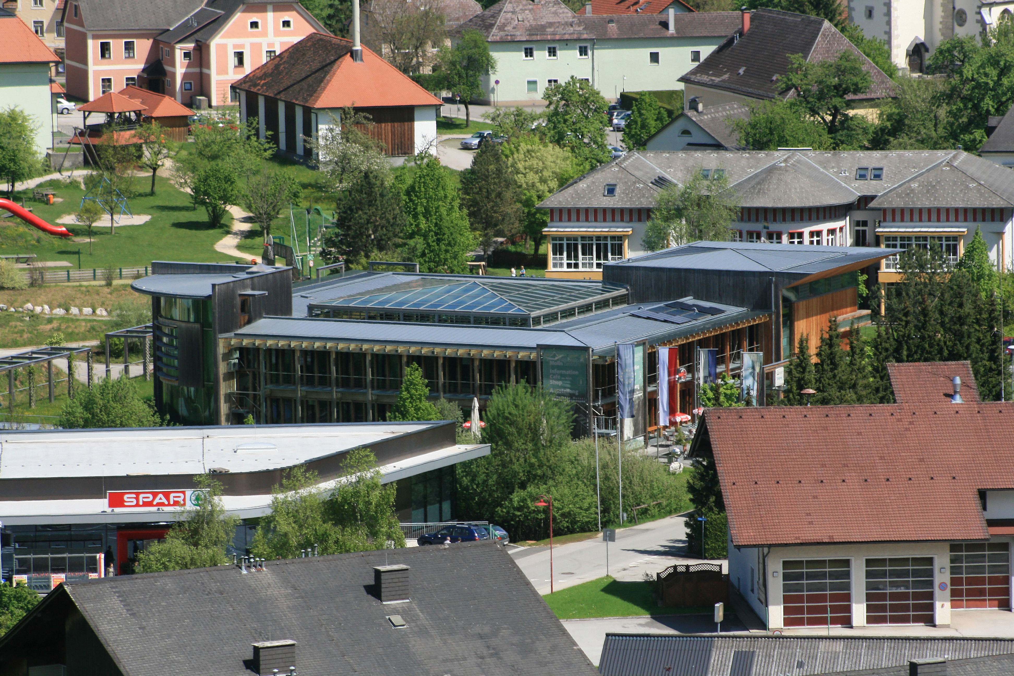 Das 2001 eröffnete Nationalpark-Zentrum in Molln